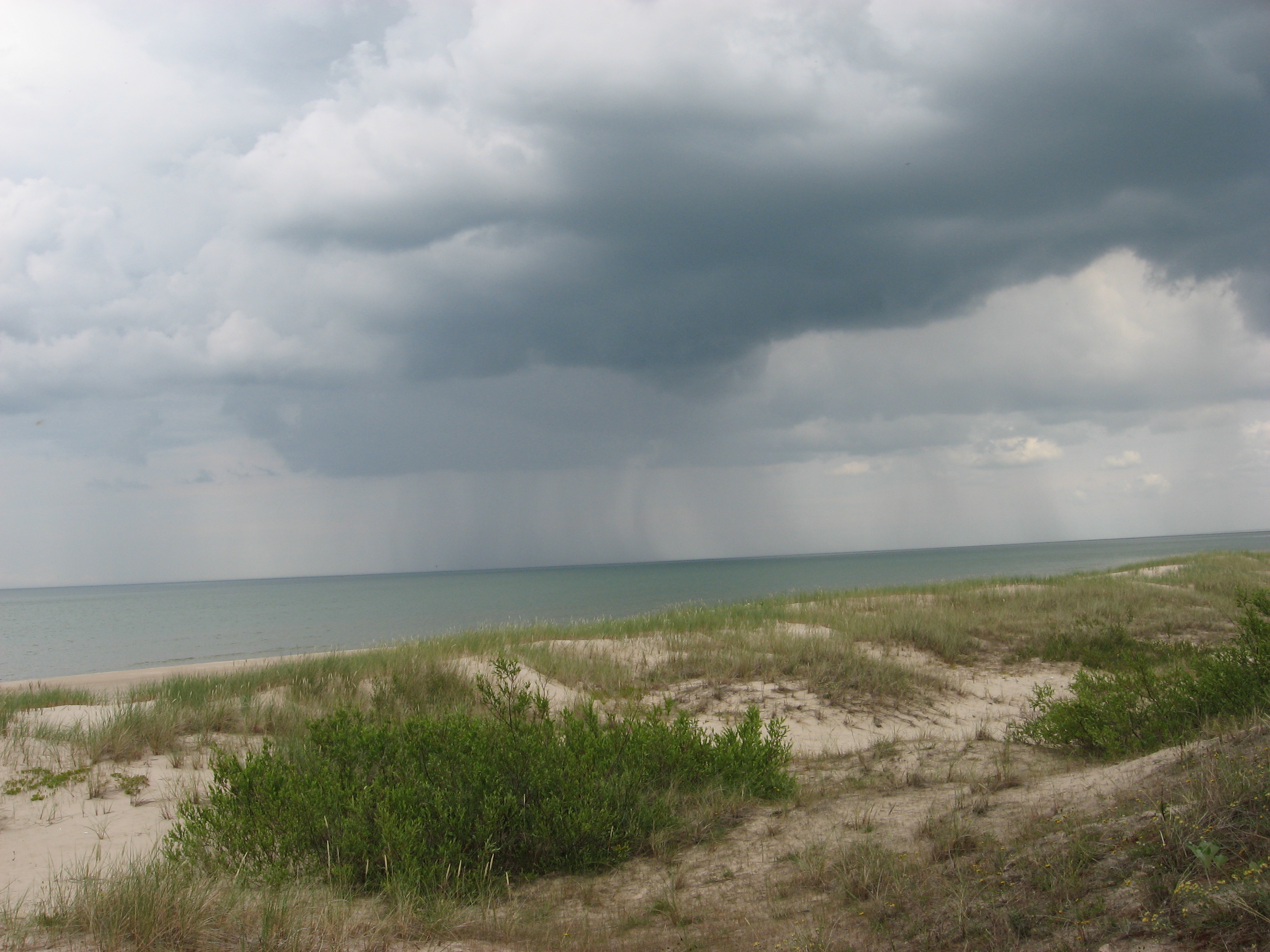 Дождь издалека (Балтийское море, Латвийское побережье)